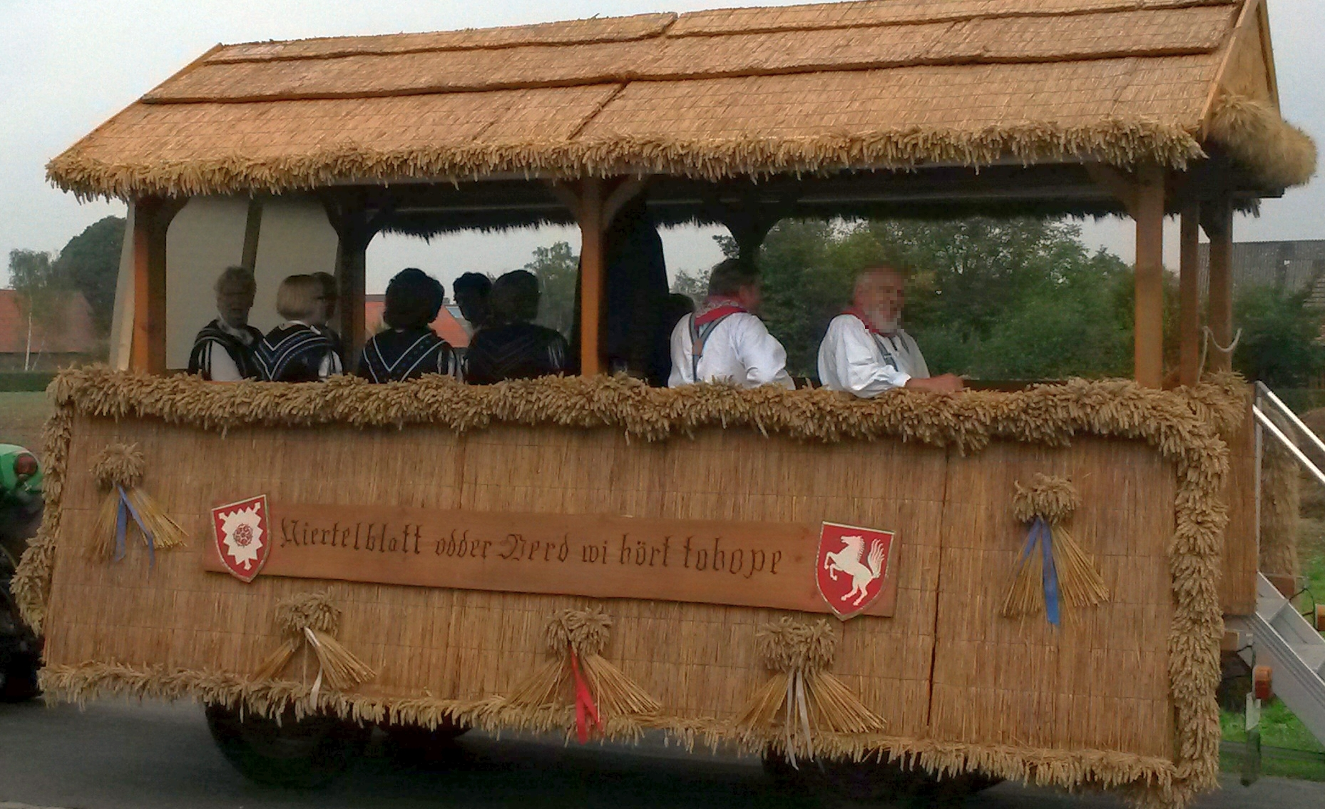 Frille Ernteumzug 2014